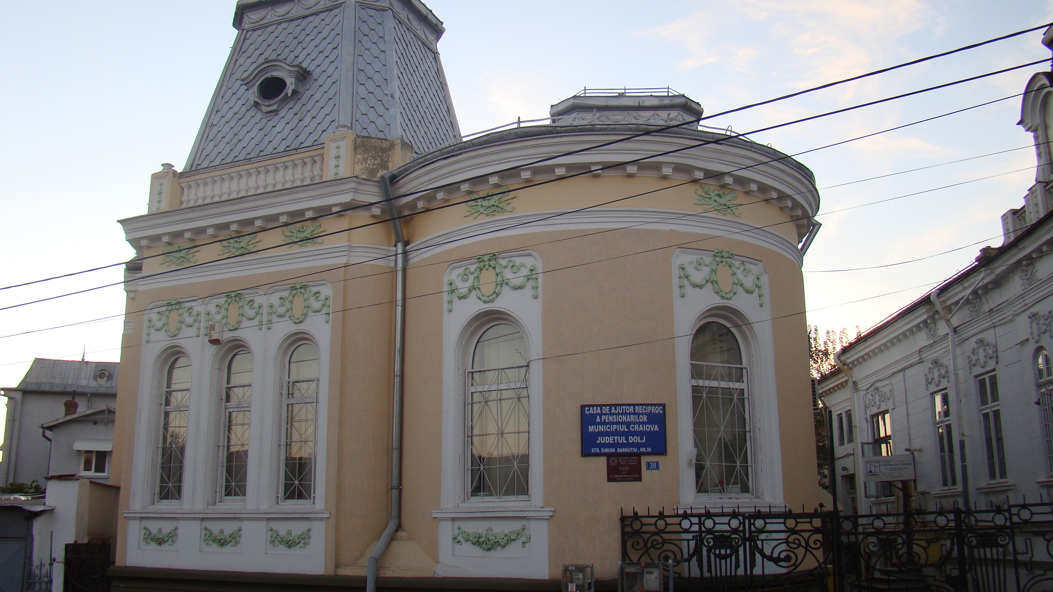 Casă 1911 Simion Bărnuţiu